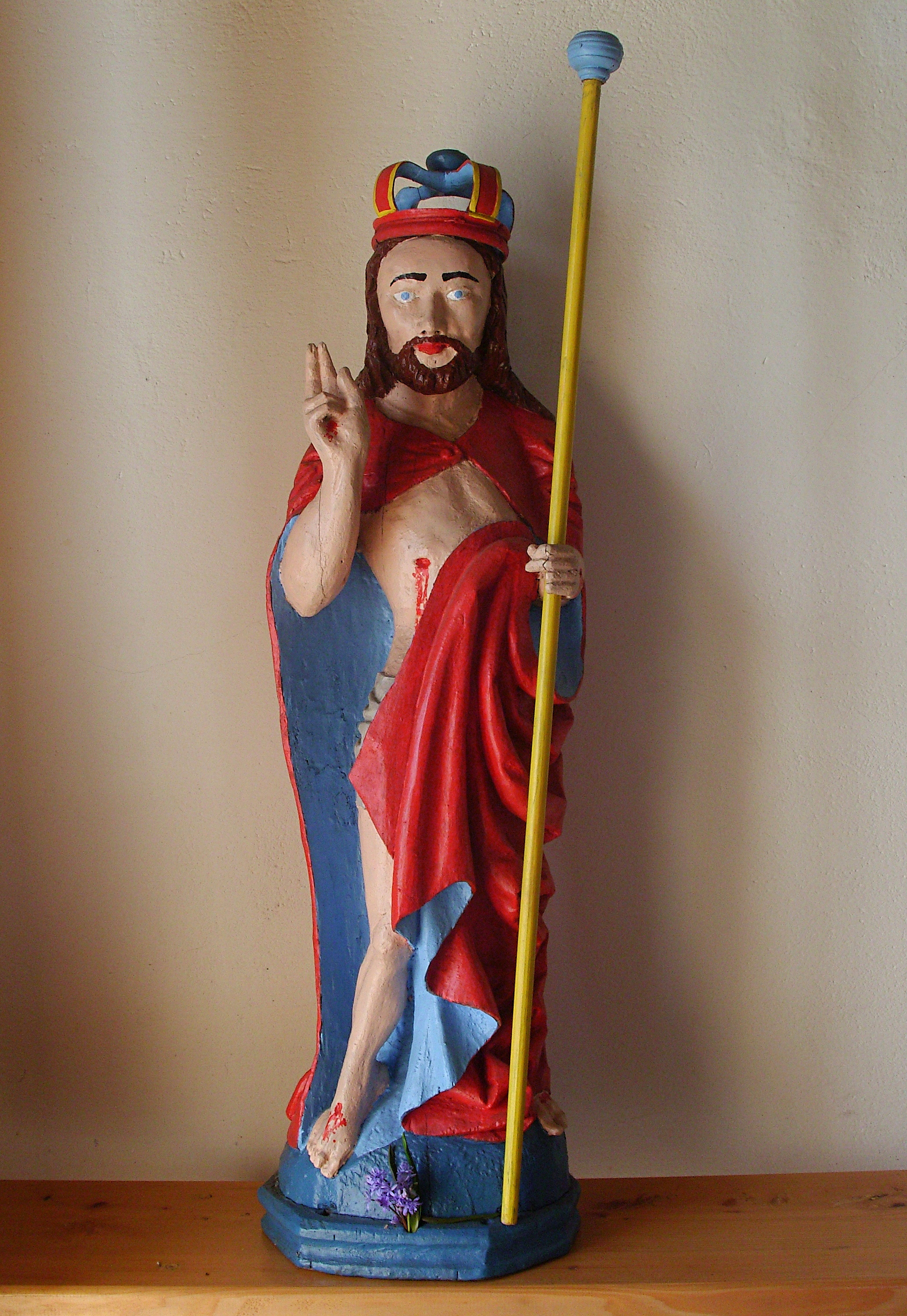 Późnogotycka, XVI-wieczna figura Pana Jezusa Zmartwychwstałego z kapliczki w Racławicach kolo Biecza